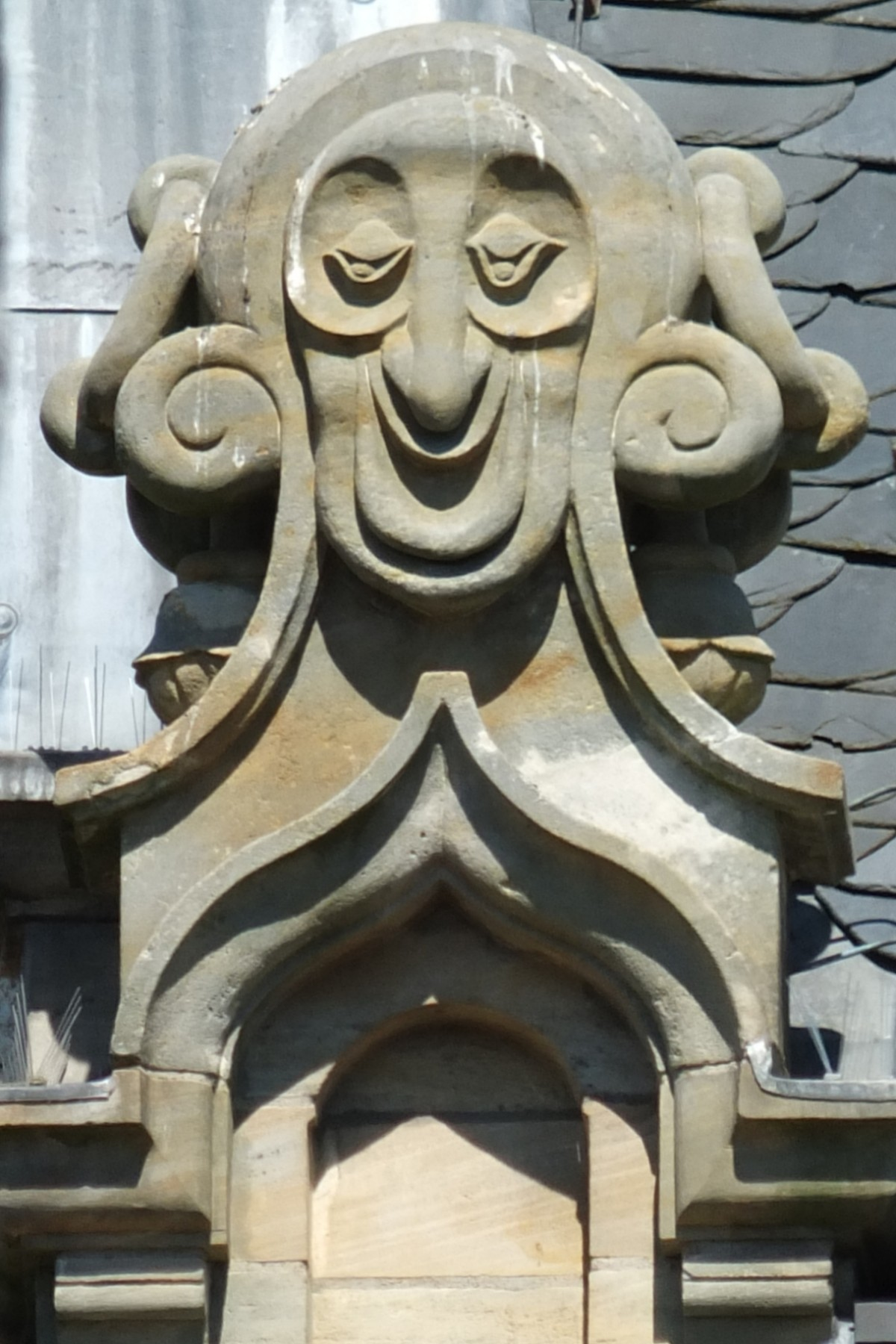 Zwinkernder Narrenkopf oberhalb der Fassade des Bürgerhauses, Hilden, Mittelstraße 40